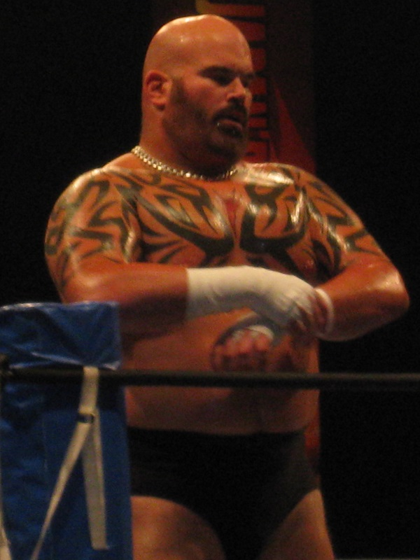 2012年2月12日 大阪府立体育会館 「THE NEW BEGINNING」 ジャイアント・バーナード